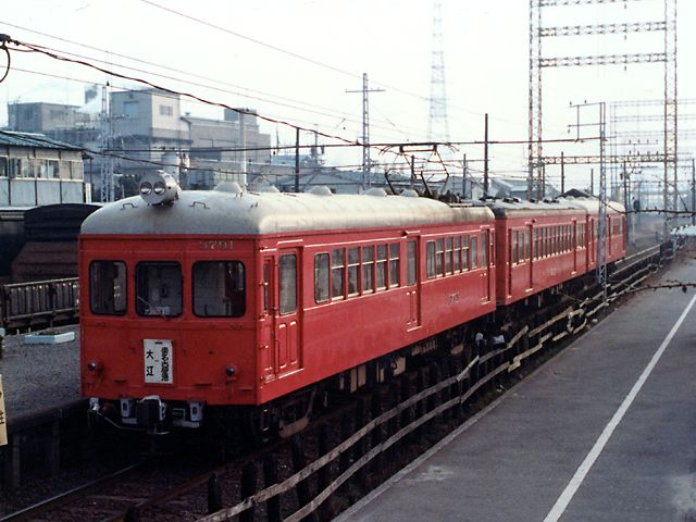 名鉄3790系3791編成。東濃鉄道よりモハ112-クハ212を1975年に譲り受けたもので、旧西武鉄道550形を出自とする「川造形」の全鋼製車。築港線専用編成として1985年まで在籍。築港線東名古屋港駅にて撮影。